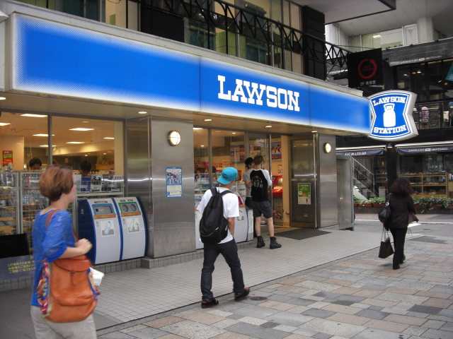 ローソン・神宮前4丁目店の外観